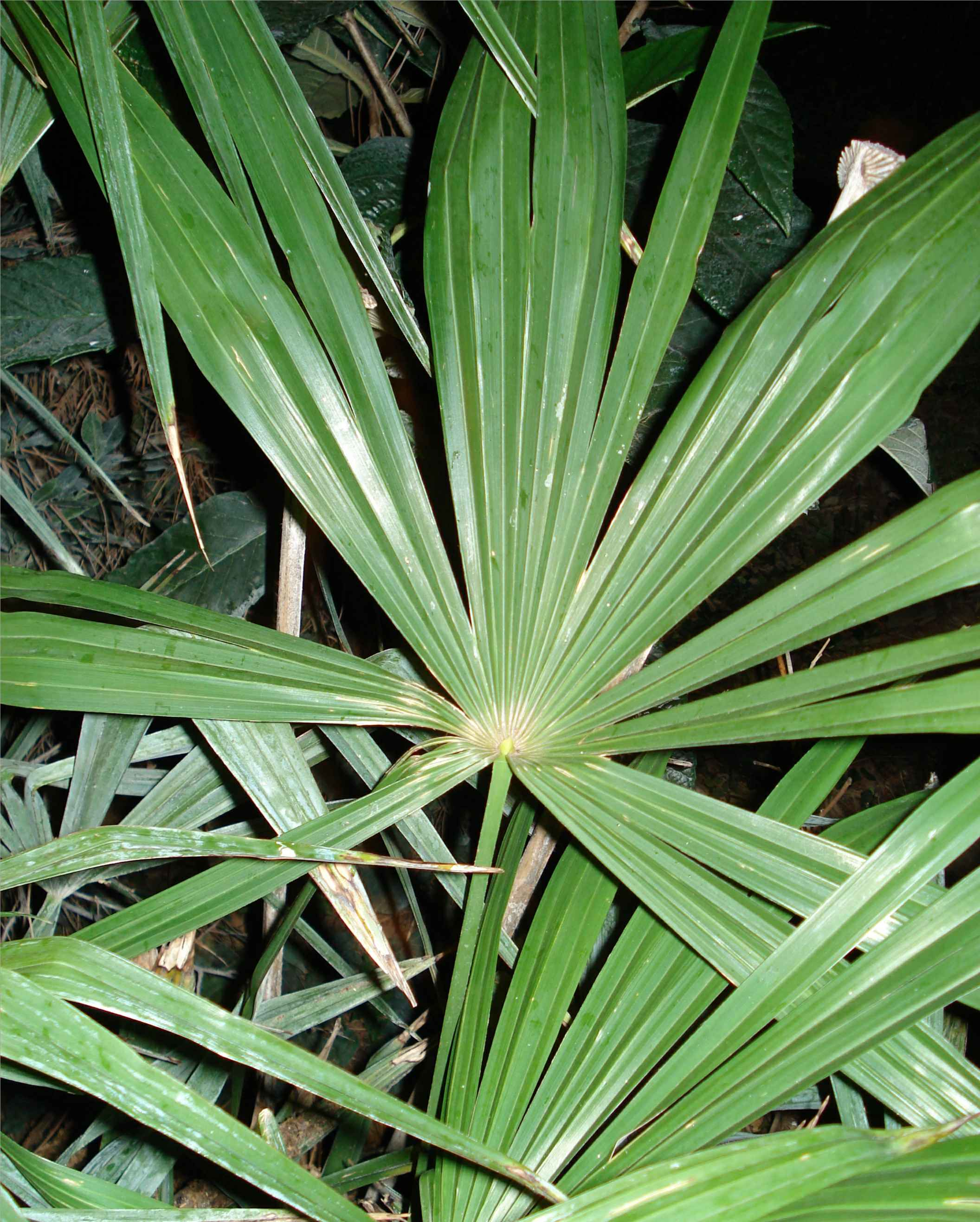 Detail du feuillage d'un jeune Trachycarpus fortunei Photo R. BENEZET le 6 2 2007 22h30